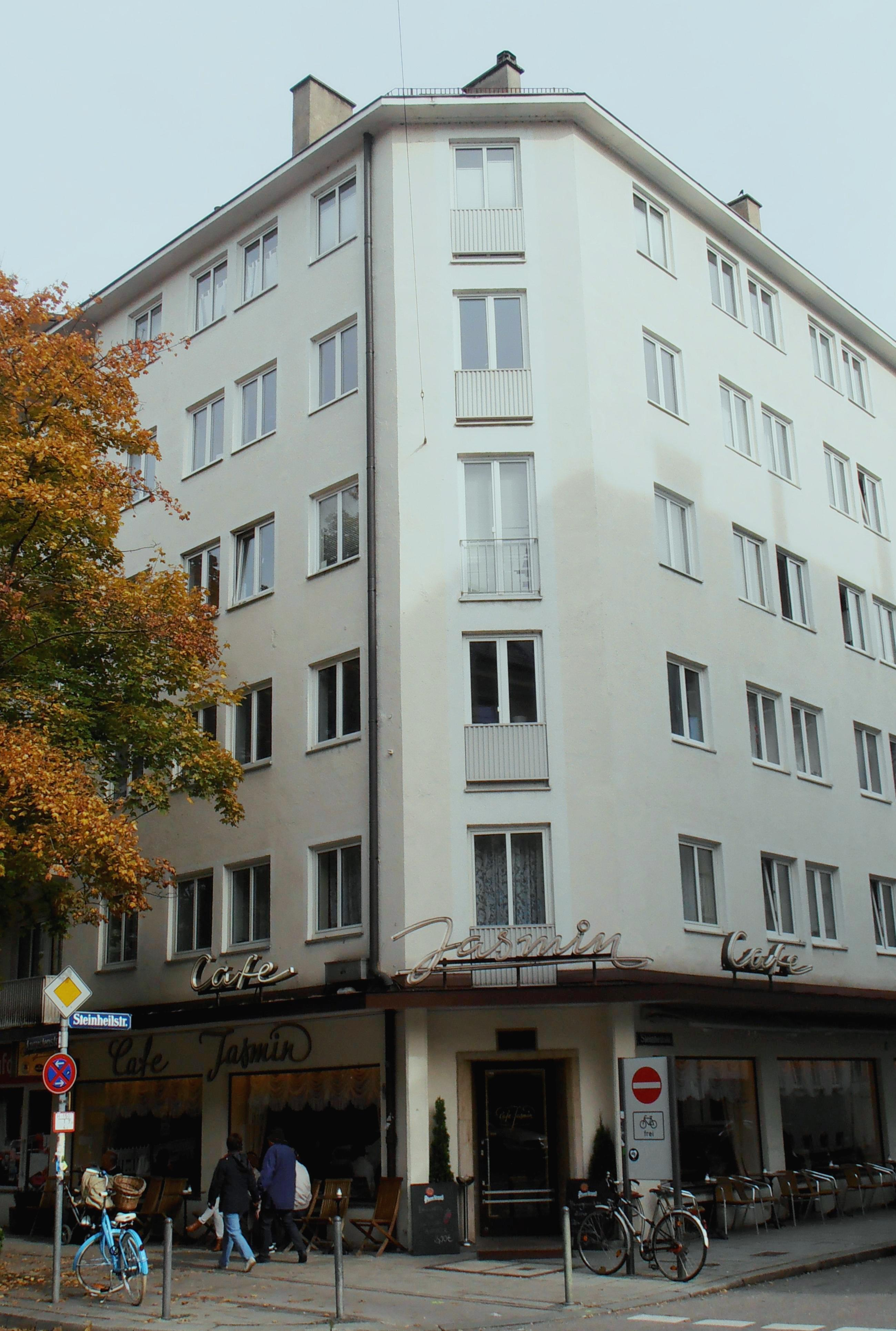 Cafe Jasmin in der Steinheilstr. 20 (Ecke Karlstr.) in München